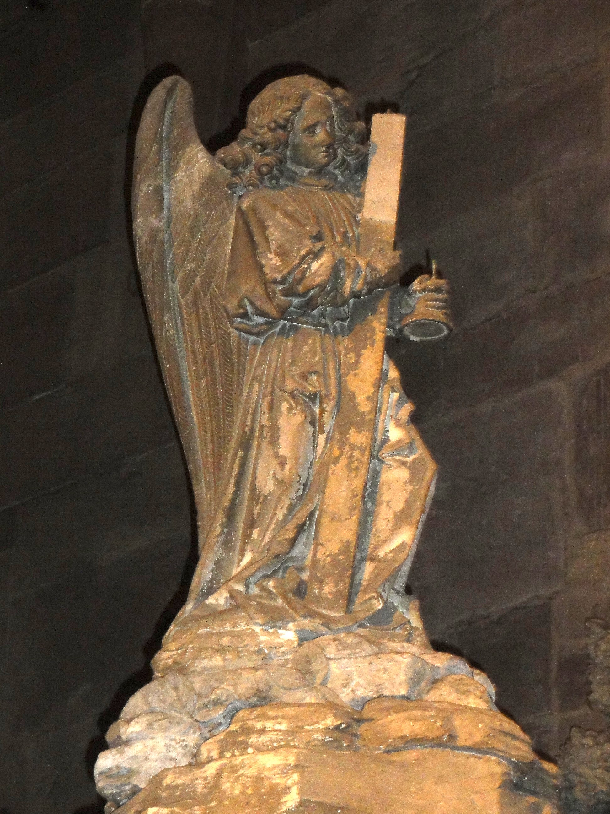 Alsace, Bas-Rhin, Cathédrale Notre-Dame de Strasbourg (PA00085015). Croisillon nord, Mont des Oliviers (XVe): Ange annonciateur.